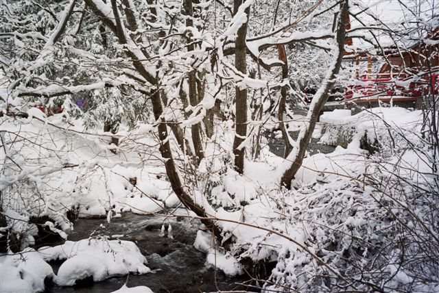 שלג